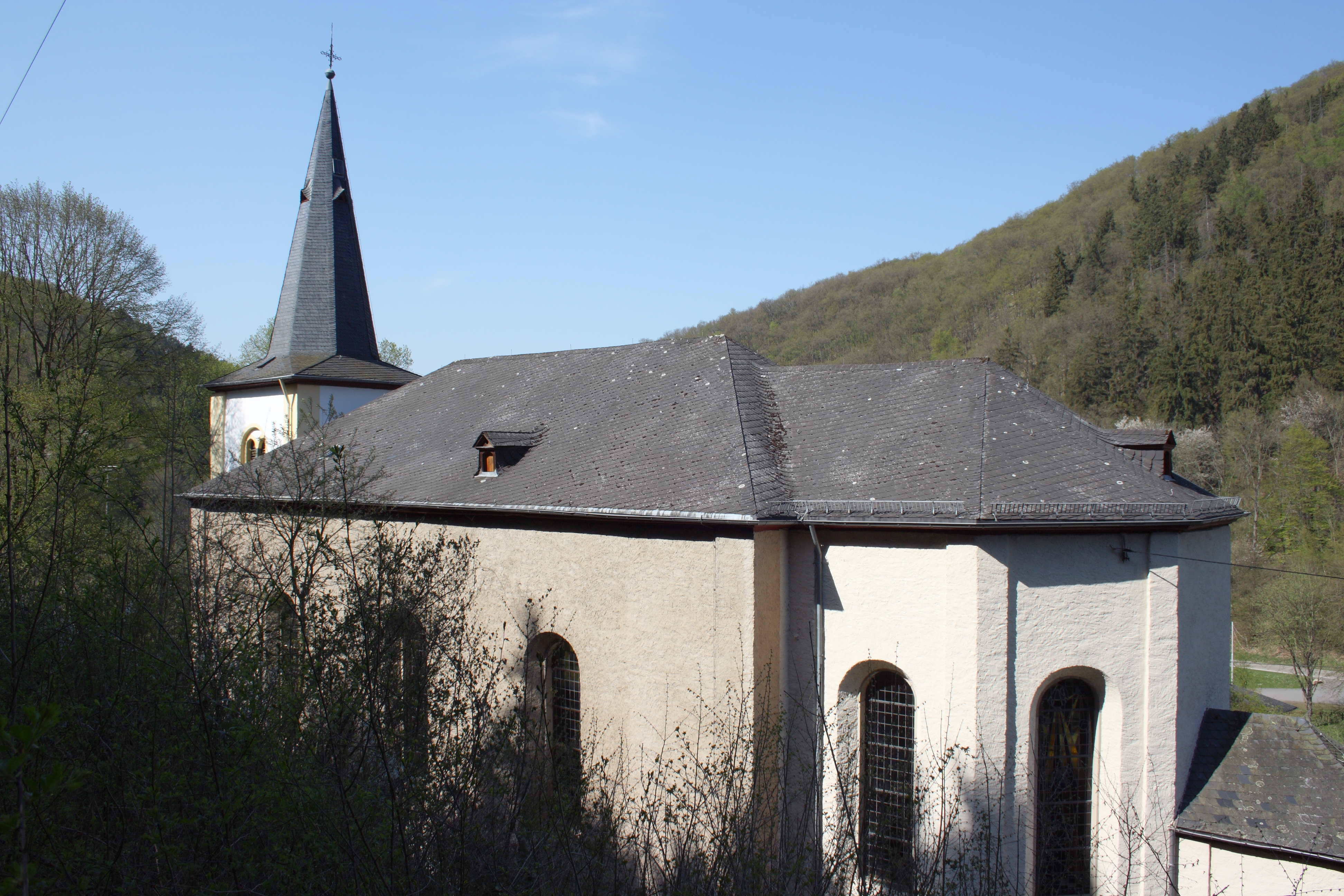 katholischen Kirche St. Pankratius und Margarita in Niederheckenbach, einem Ortsteil von Heckenbach